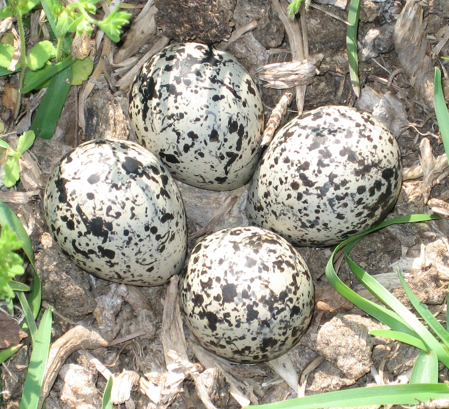 Four Killdeer eggs in grassy depression.